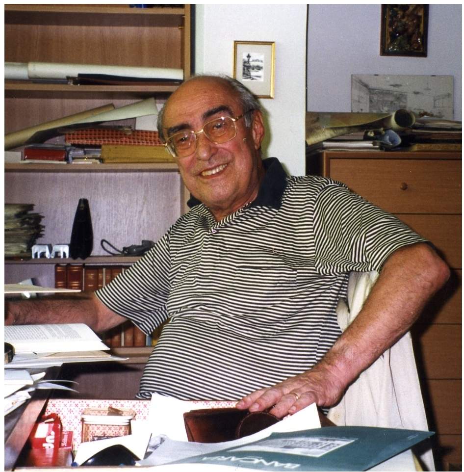 Alberto Grilli nella sua casa di Trieste